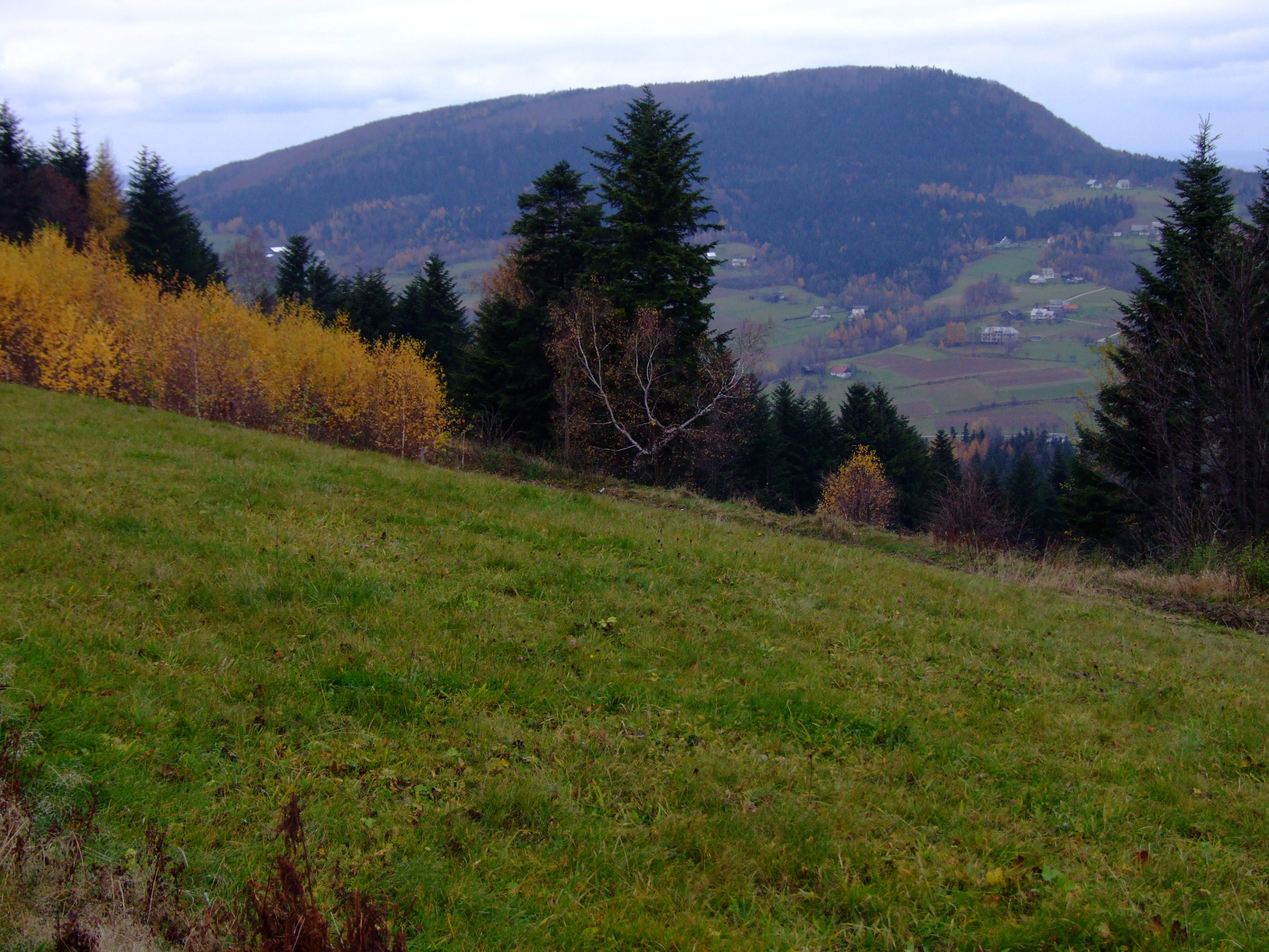 Kostrza - widok z Zęzowa (Beskid Wyspowy)